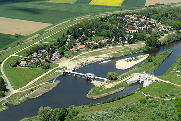 Légi fotó a Nickhez tartozó Műgát nevű telepről